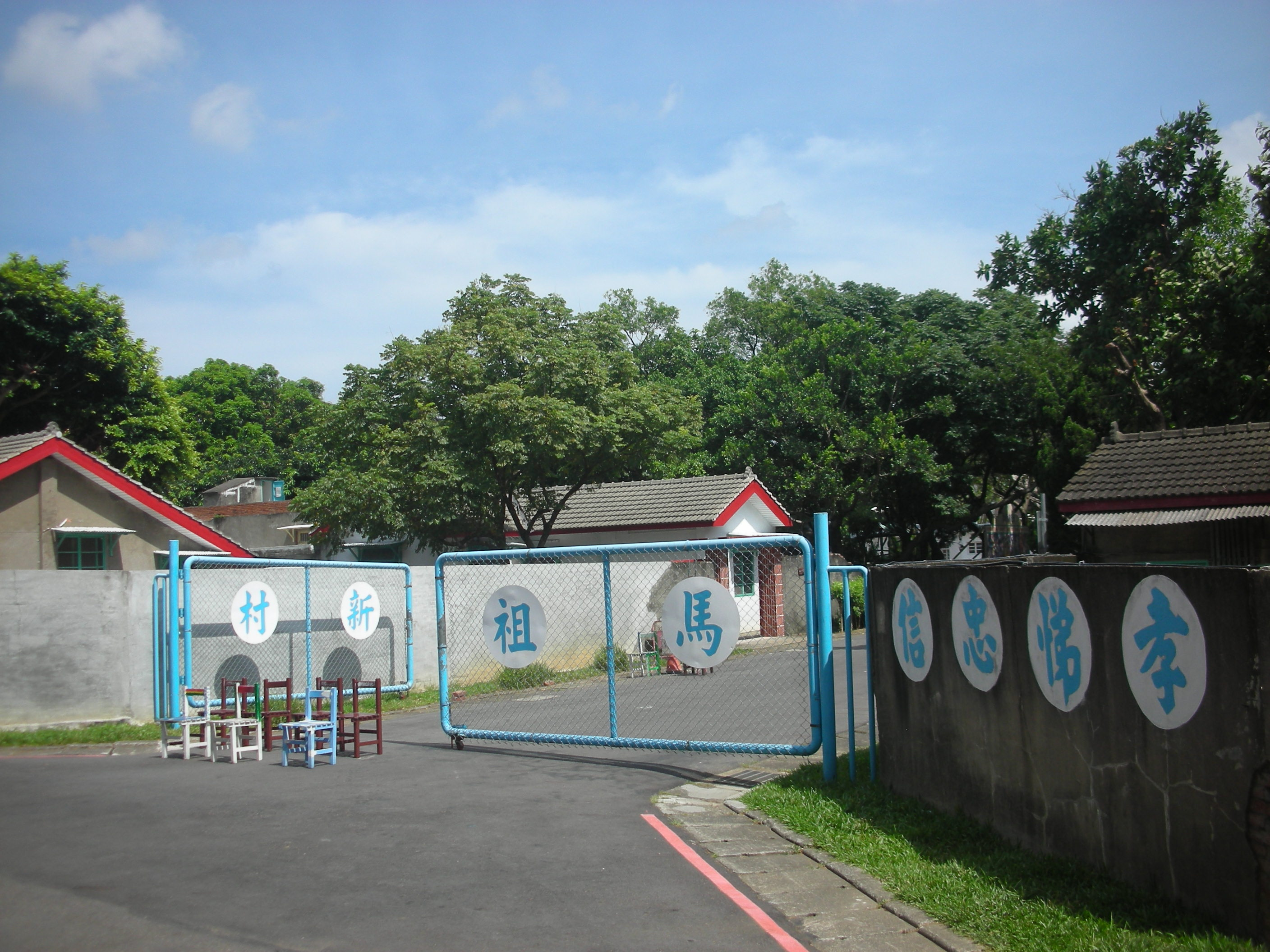 中壢馬祖新村 大門。